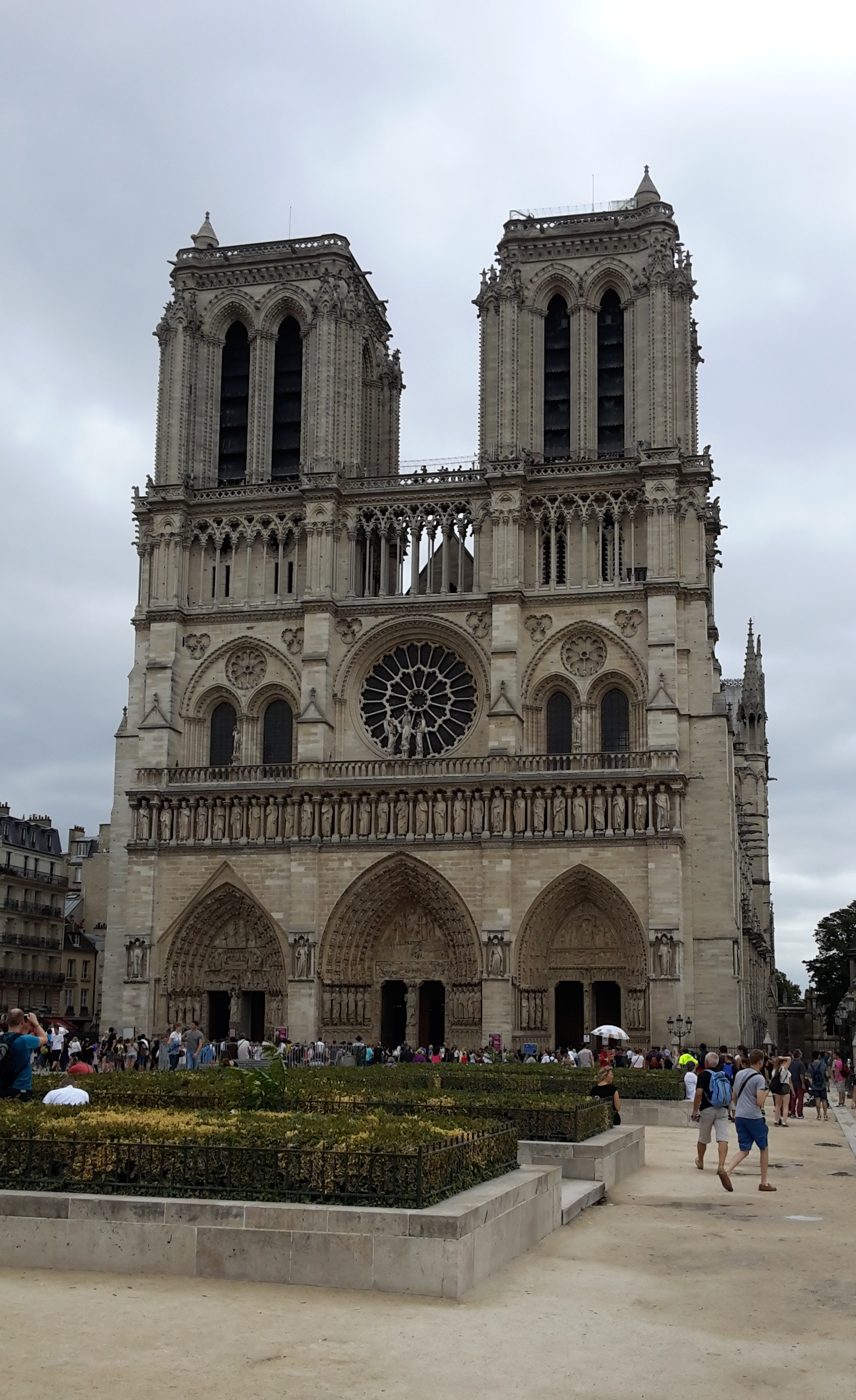 Façade ouest de Notre-Dame de Paris